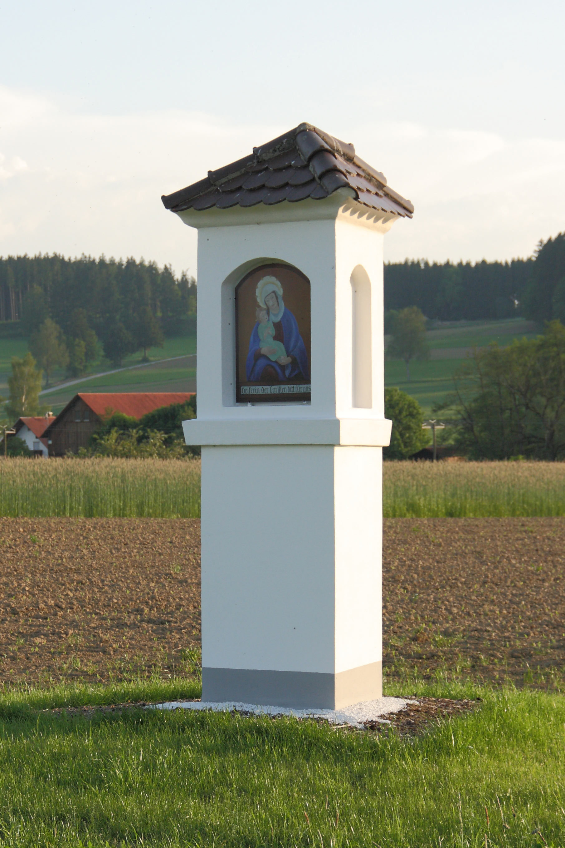 Bildstock aus dem 18. Jh. mit neuerem Muttergottesbild an der B 16 ca. 1 km südl. Aletshausen